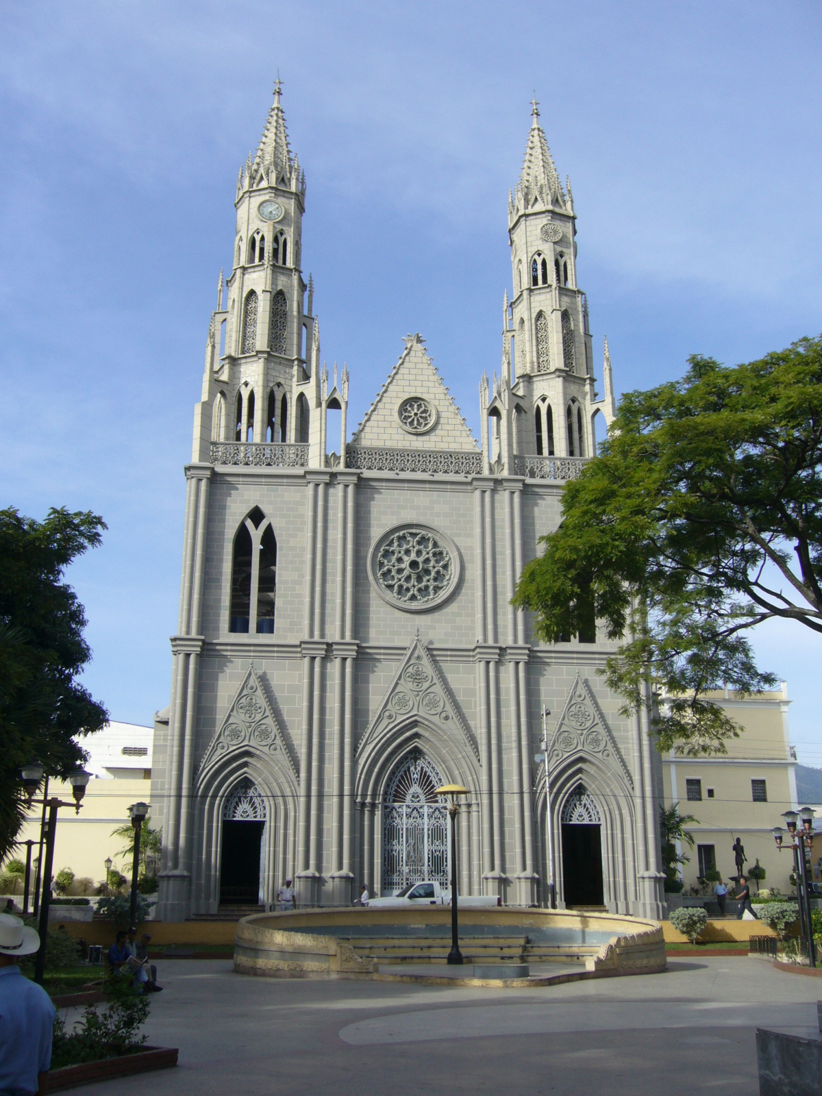 Parroquia San Juan Bautista-Valera